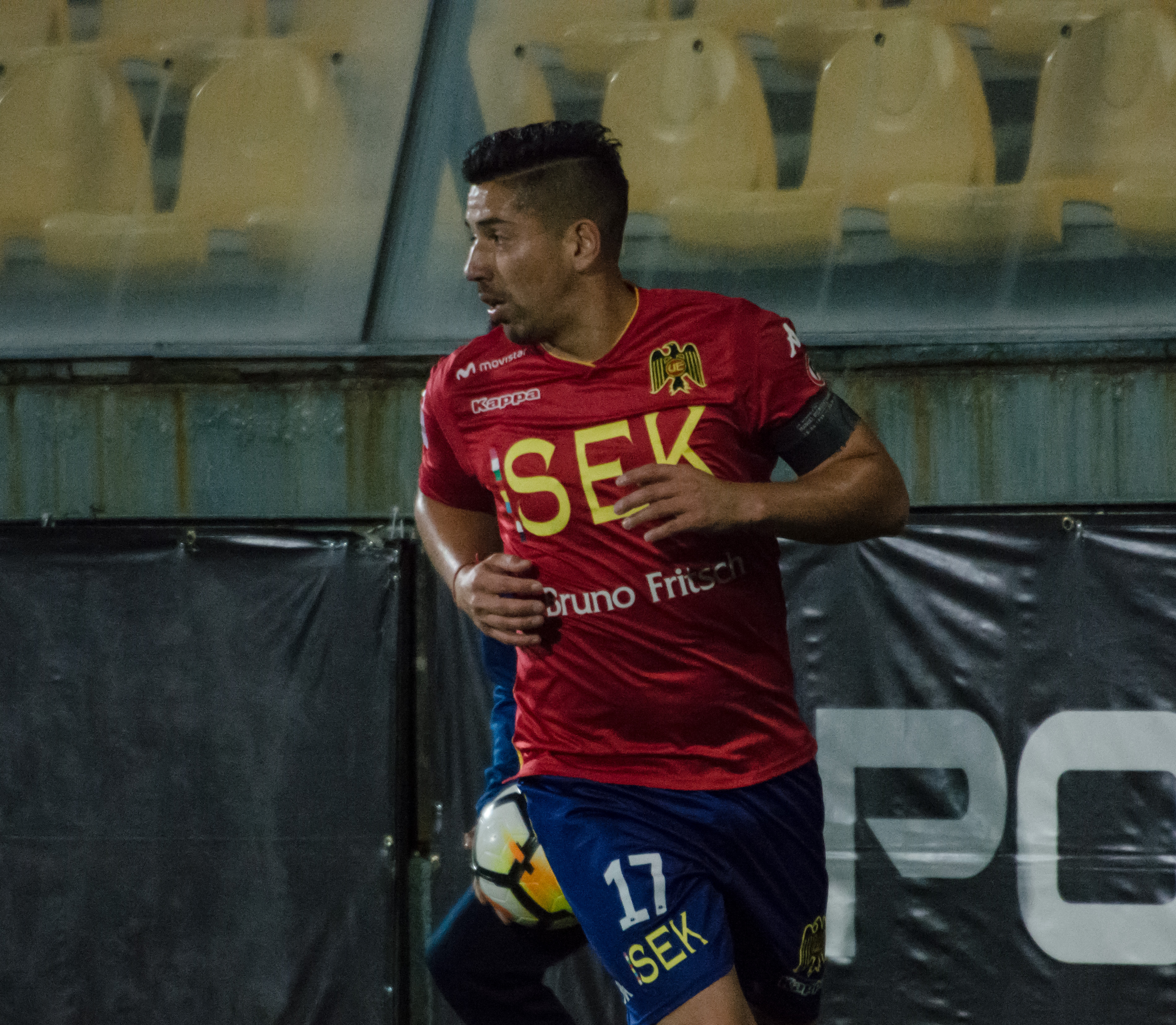 Jorge Ampuero, Unión Española v Curicó Unido, Estadio Santa Laura, Independencia, Santiago, Chile